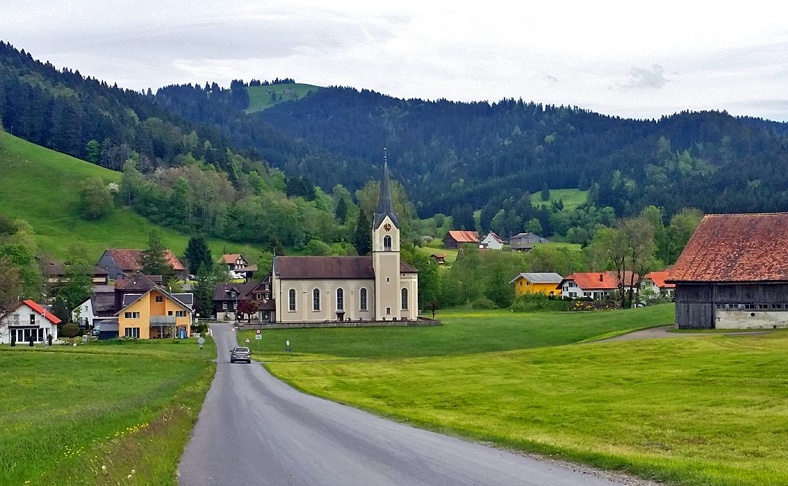 Das Dorf Egg bei Einsiedeln, Kanton Schwyz